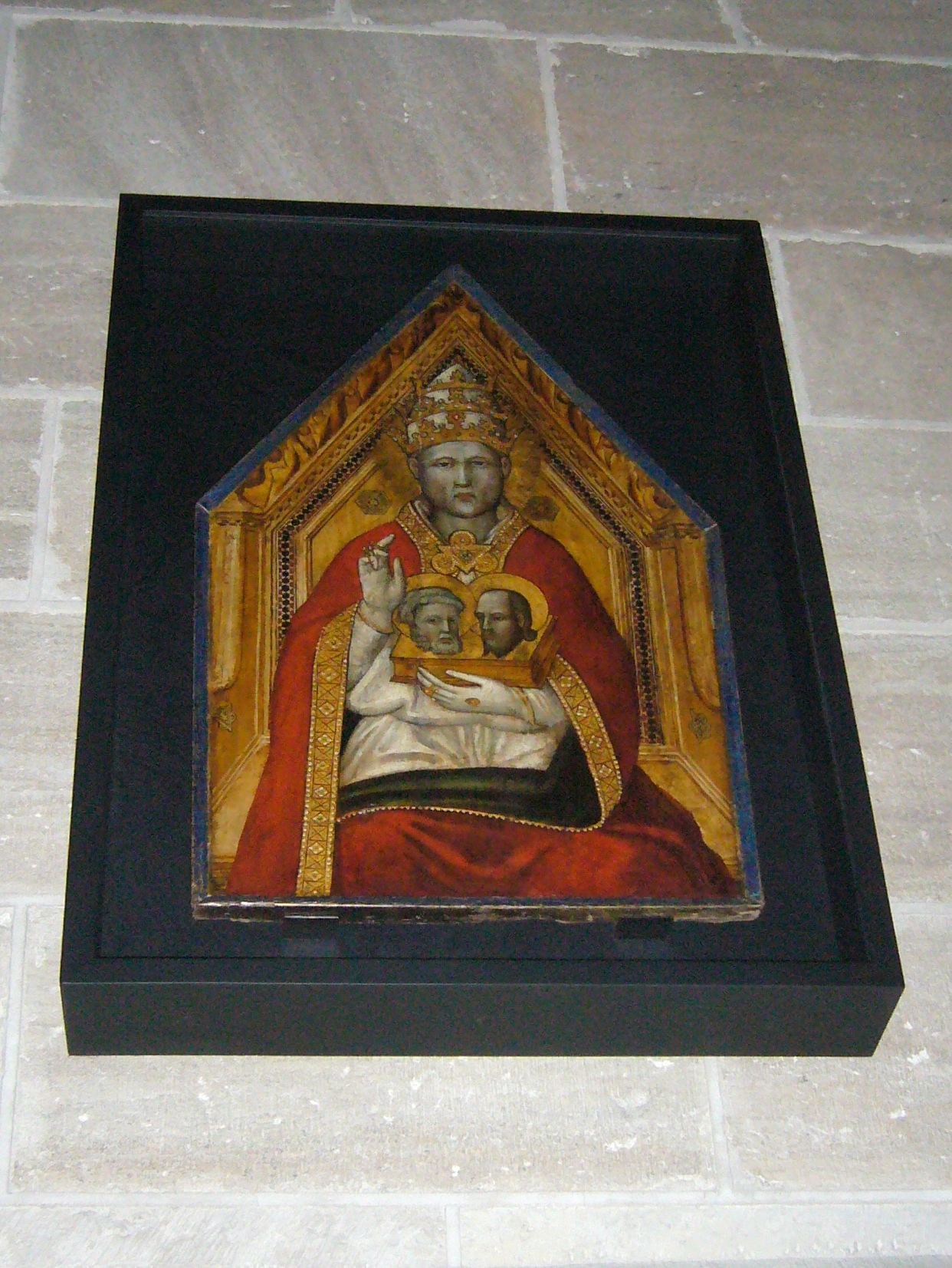 Portrait d'Urbain V en la cathédrale de Mende (Lozère, France)